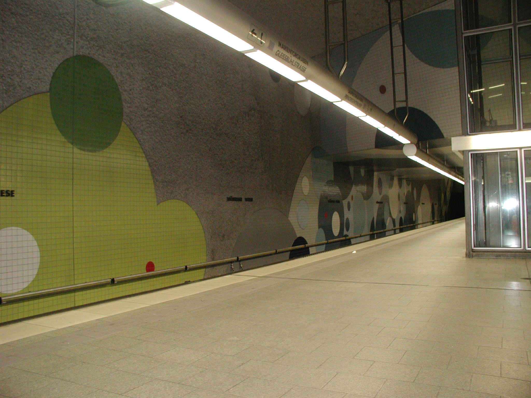 U-Bahnhof Nürnberg Wöhrder Wiese